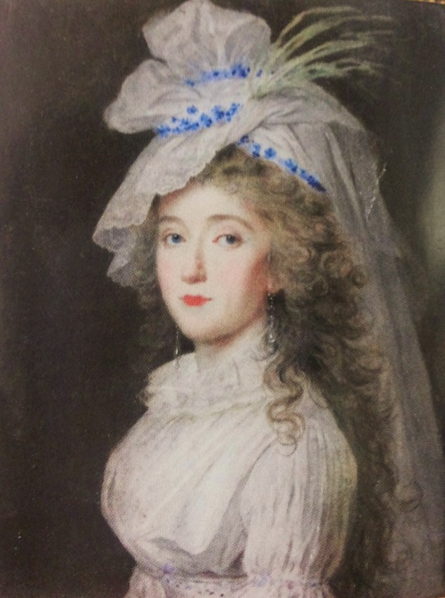 Графиня Екатерина Ивановна Тизенгаузен, ур. Штакельберг (1753—1826)